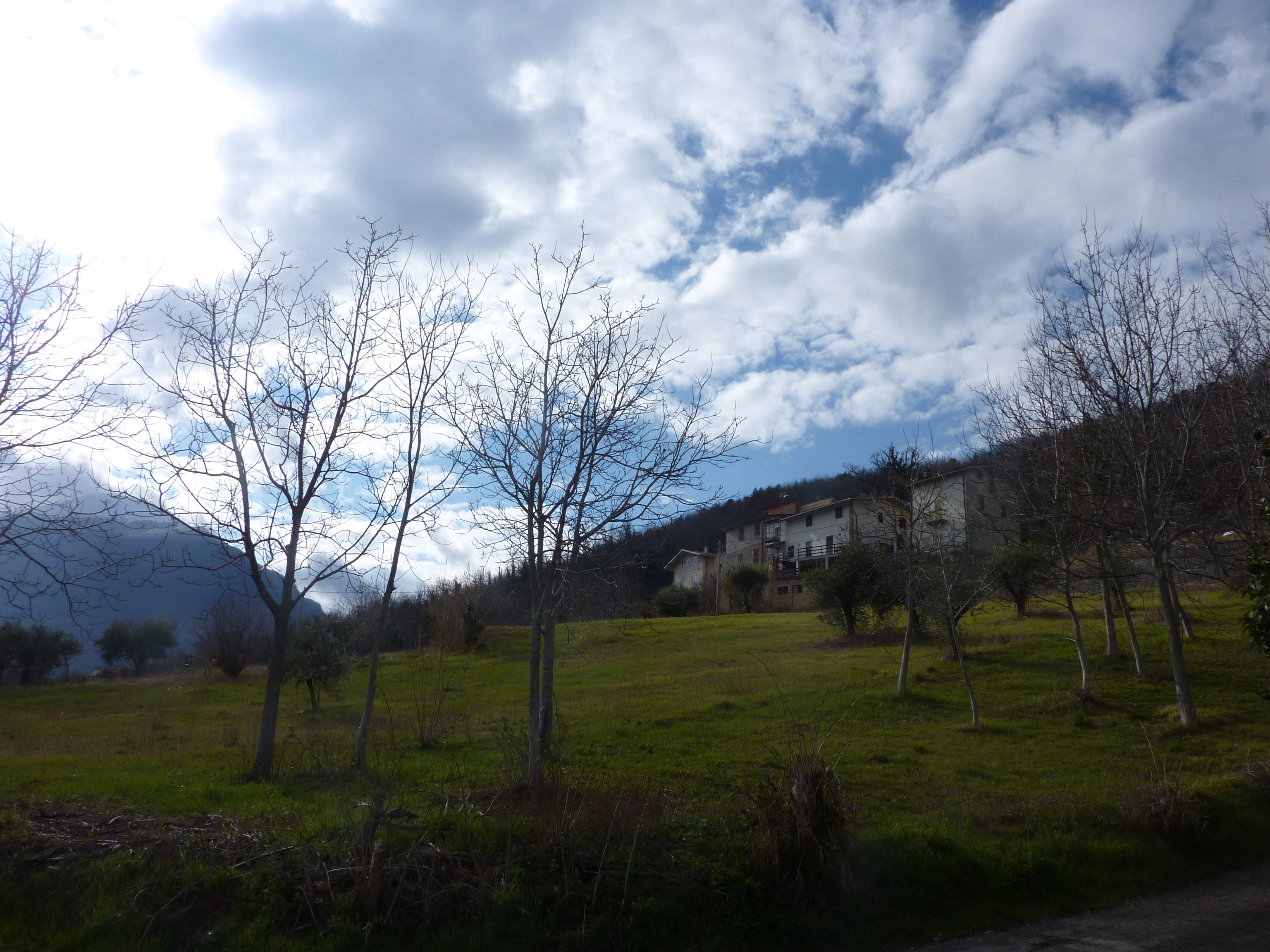 Rocca Case d'Angelo abbarbicata sul colle San Nicola